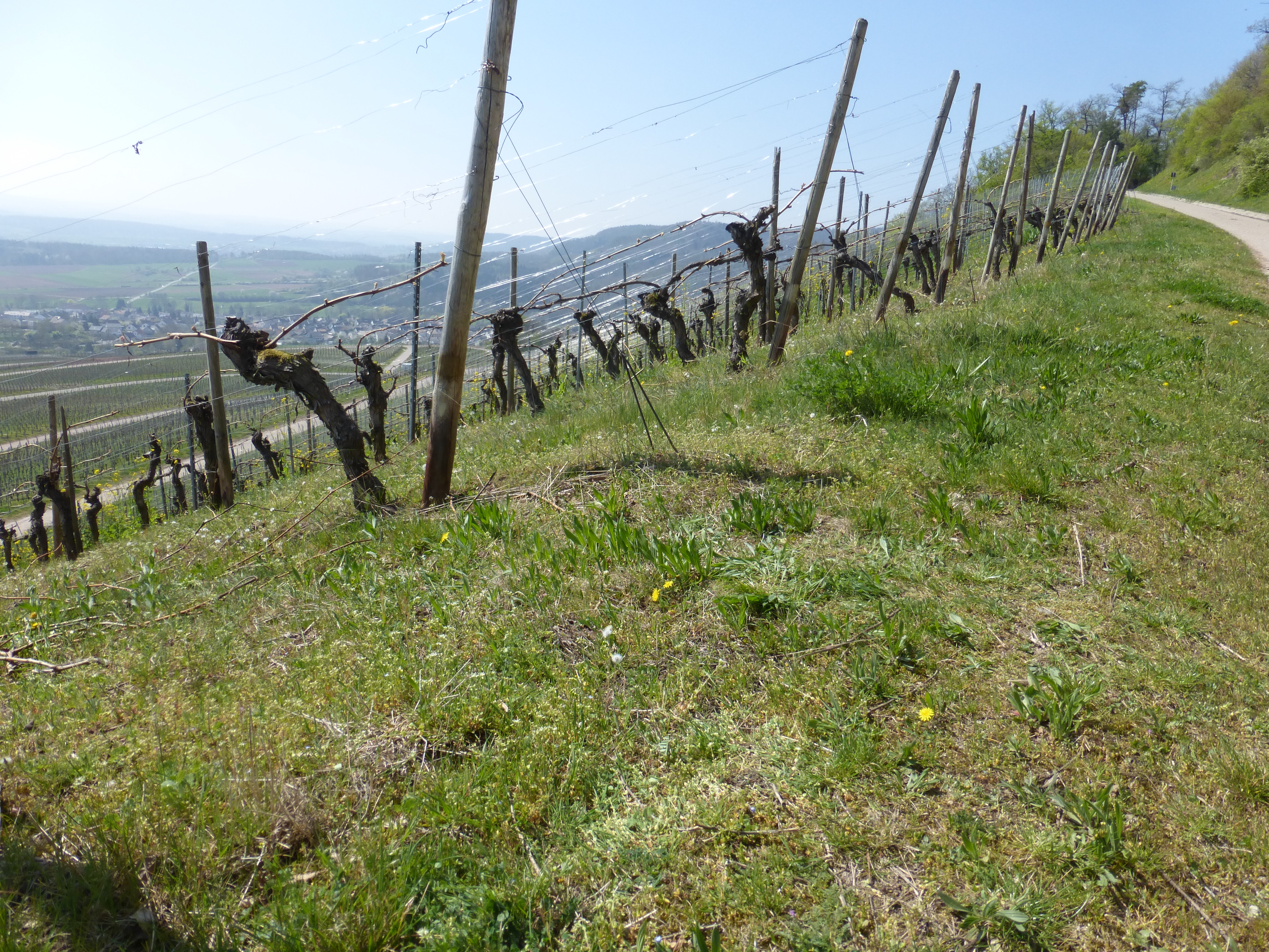 Geschlitztblättriger Löwenzahn (Taraxacum lacistophyllum) Pfefferberg Sachsenheim-Hohenhaslach 9. April 2017